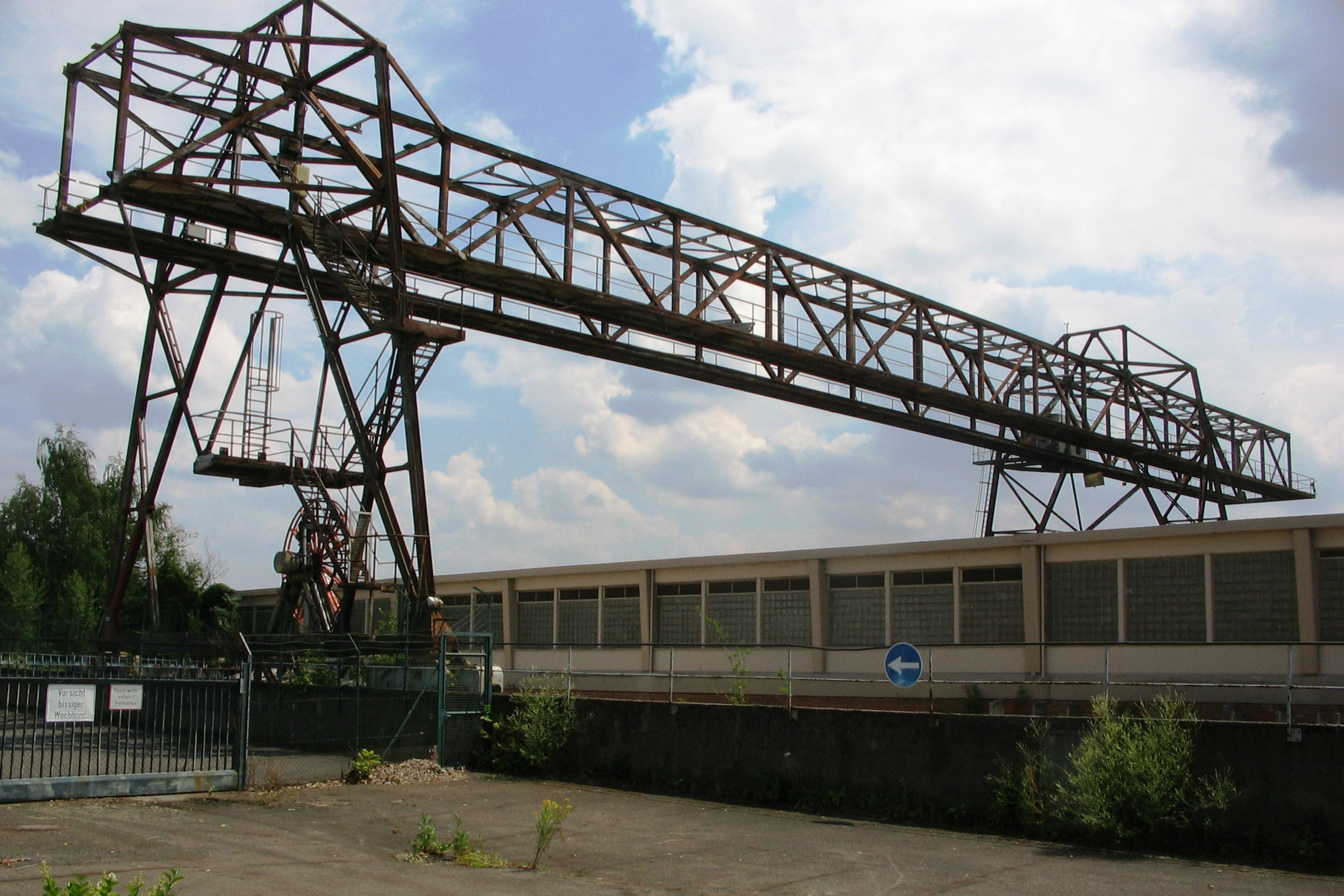 Landseitige Totalansicht des Portalkrans über dem Tunnel für die Bundesstraße 42 am Oestricher Industriegebiet, dahinter das Rheinufer